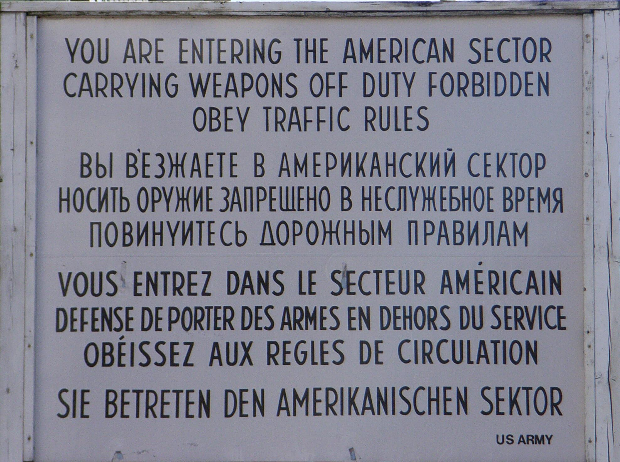 Dieses Bild zeigt das Warnschild am Checkpoint Charlie.